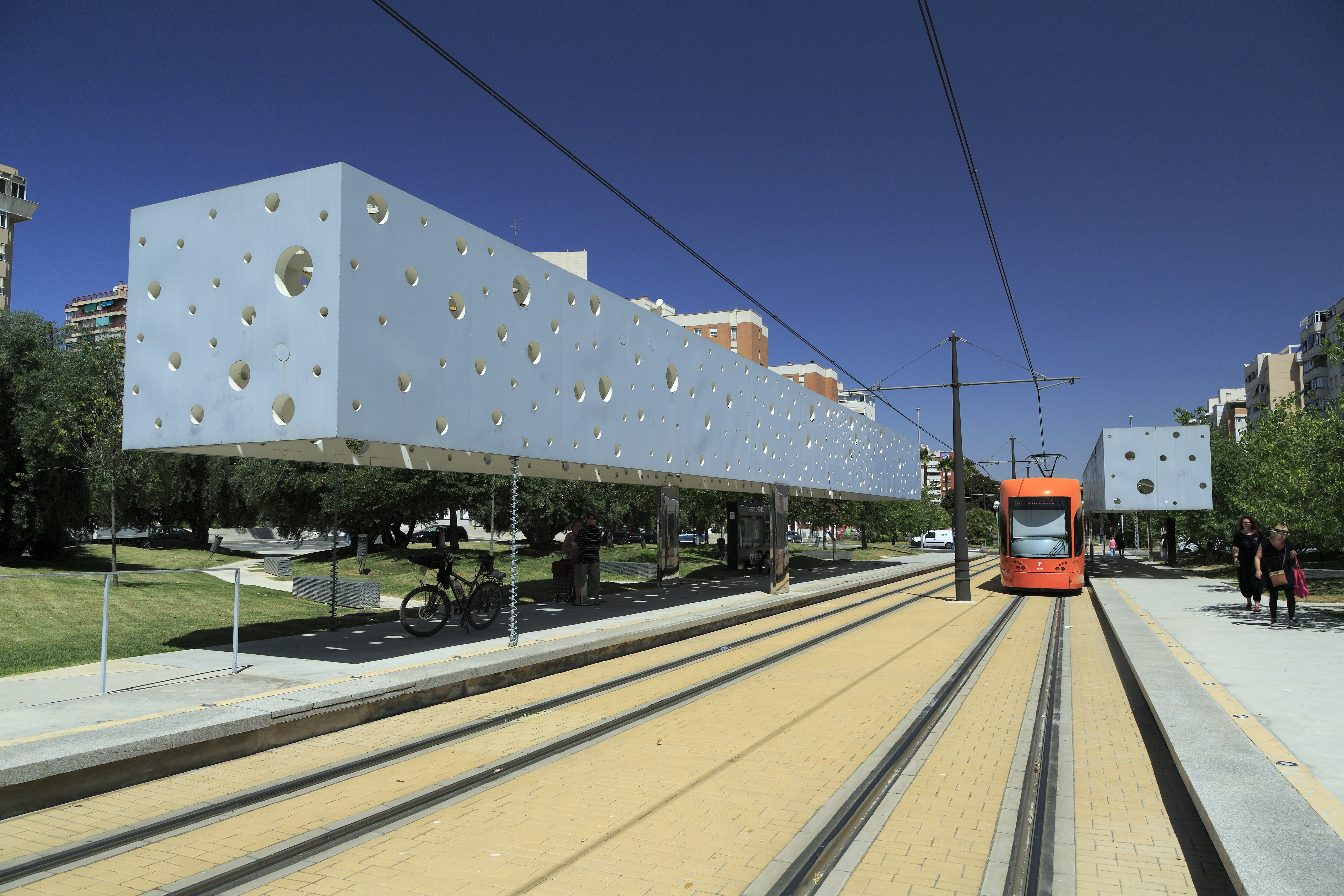 Die eigenwilligen, freitragenden Bahnsteigdächer gibt es nur an dieser Stelle. Sie stehen auf zwei Stützen, am kurzen Ende (im Bild links) sind sie jeweils mit zwei Zugankern im Boden befestigt. Aus der Nähe und vor allem von unten sind jedoch schon sichtbare Anstrichs- und Korrosionschäden zu erkennen, insbesondere dort, wo die Plasteabdeckungen der Lichtöffnungen nach oben fehlen.